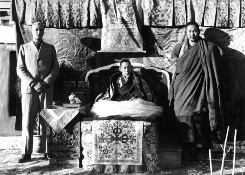 Lhasa, Regent